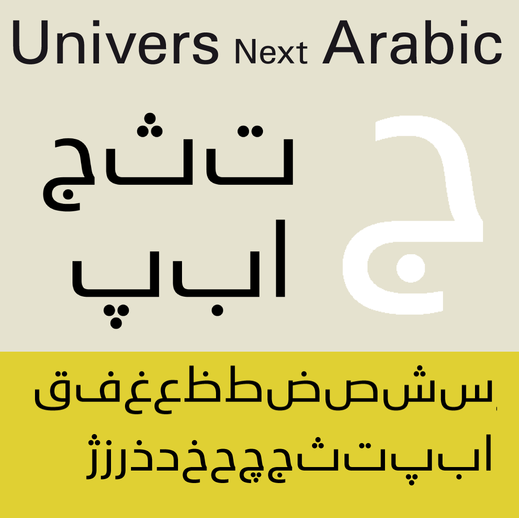 Univers Next Arabic, mostra tipogràfica